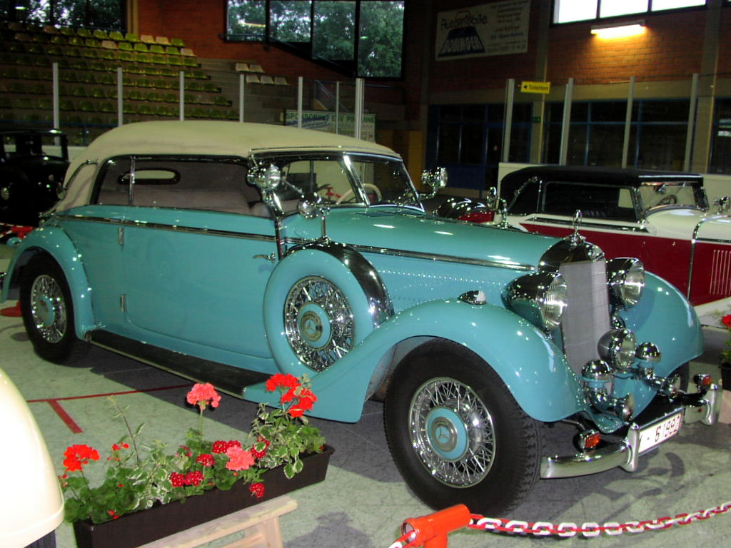 Mercedes-Benz 320 Cabriolet B (1938)